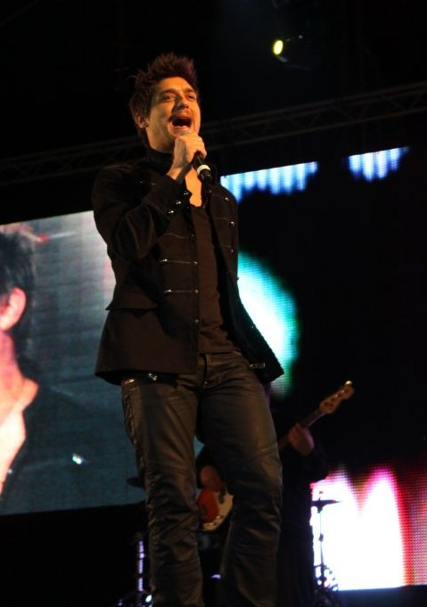 Diego Martin actuando en el Primavera Pop 2010 en Barcelona.